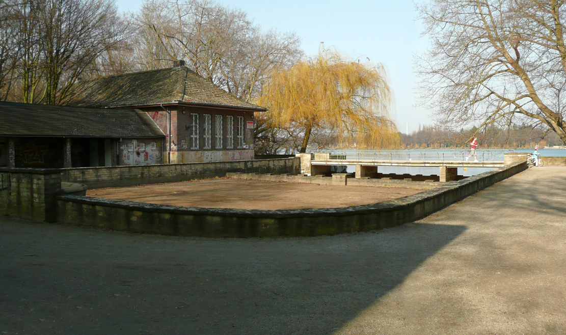 Maschseequelle